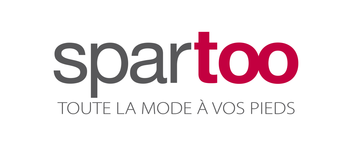 Logo Spartoo